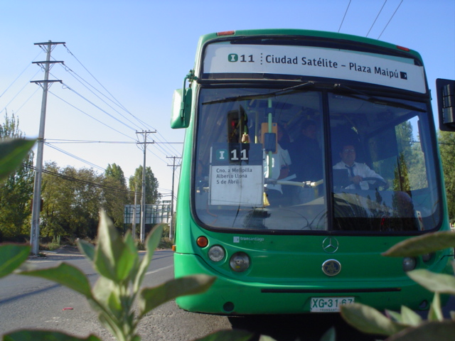 Microbus i11 Ciudad Satelite